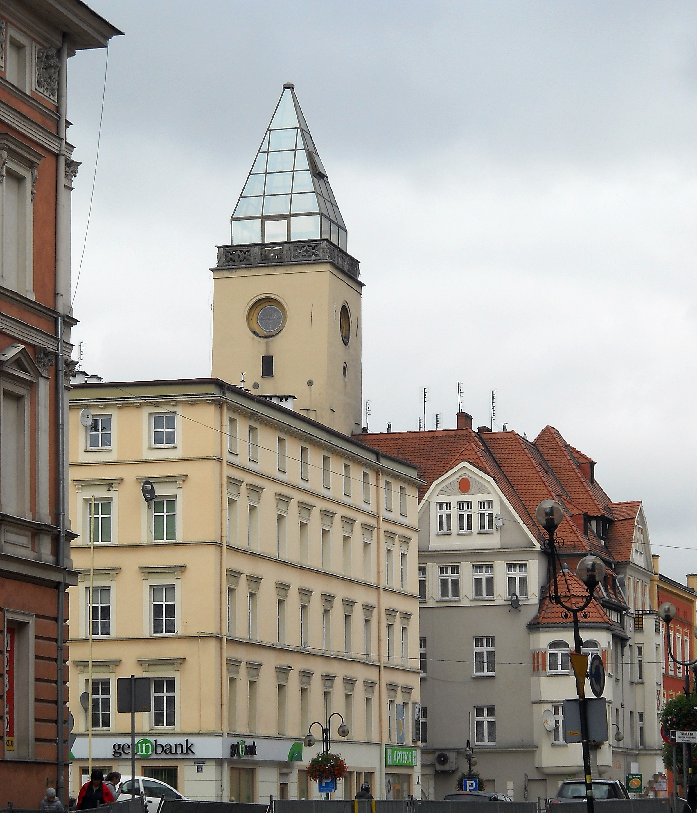 Strzegom - wieża ratuszowa (targowa)